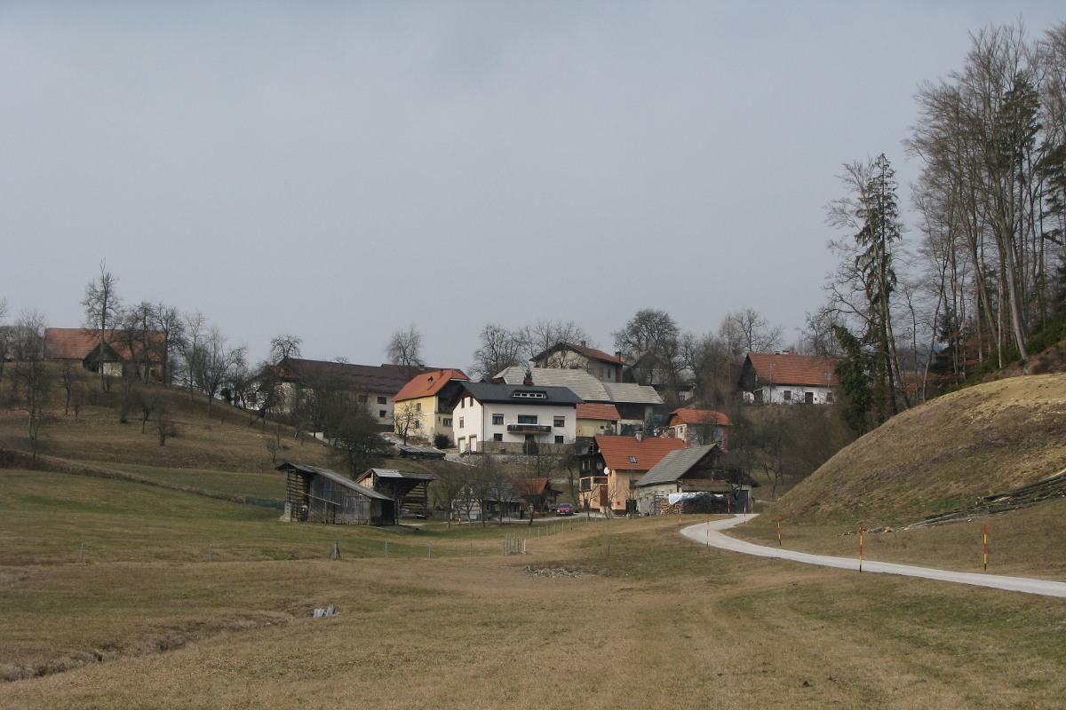 Del naselja Žvarulje (občina Zagorje ob Savi)